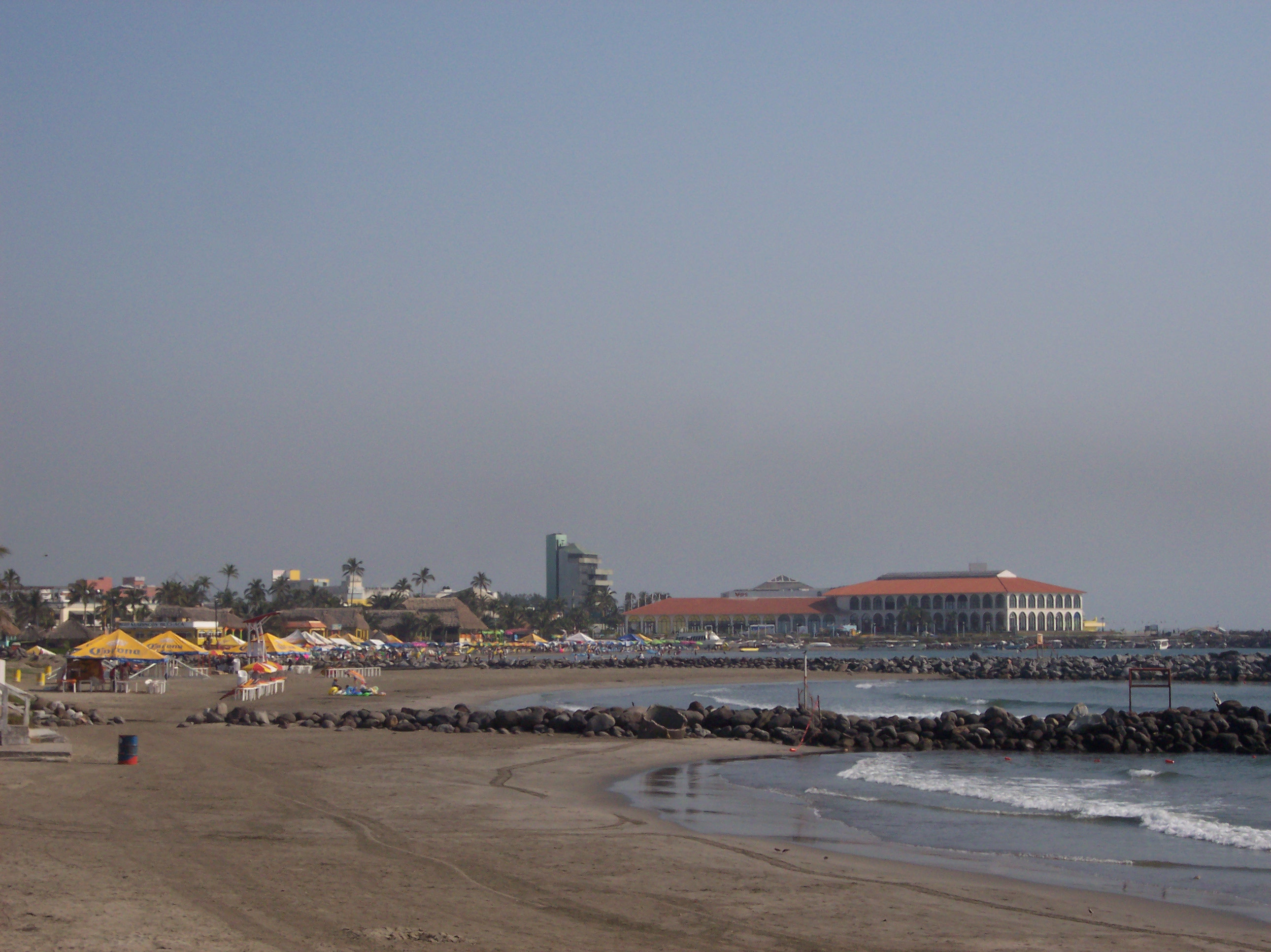 Villa del Mar Beach, this is a famous and old traditional beach of the City of Veracruz. At the bottom-right we can see the aquarium. SPANISH: Playa Villa del Mar, es una famosa y tradicional playa de la ciudad de Veracruz. Al fondo y a la derecha se ve el acuario. Port and City of Veracruz. Estate of Veracruz, Mexico. SPANISH: Ciudad y Puerto de Veracruz, Estado de Veracruz, México.